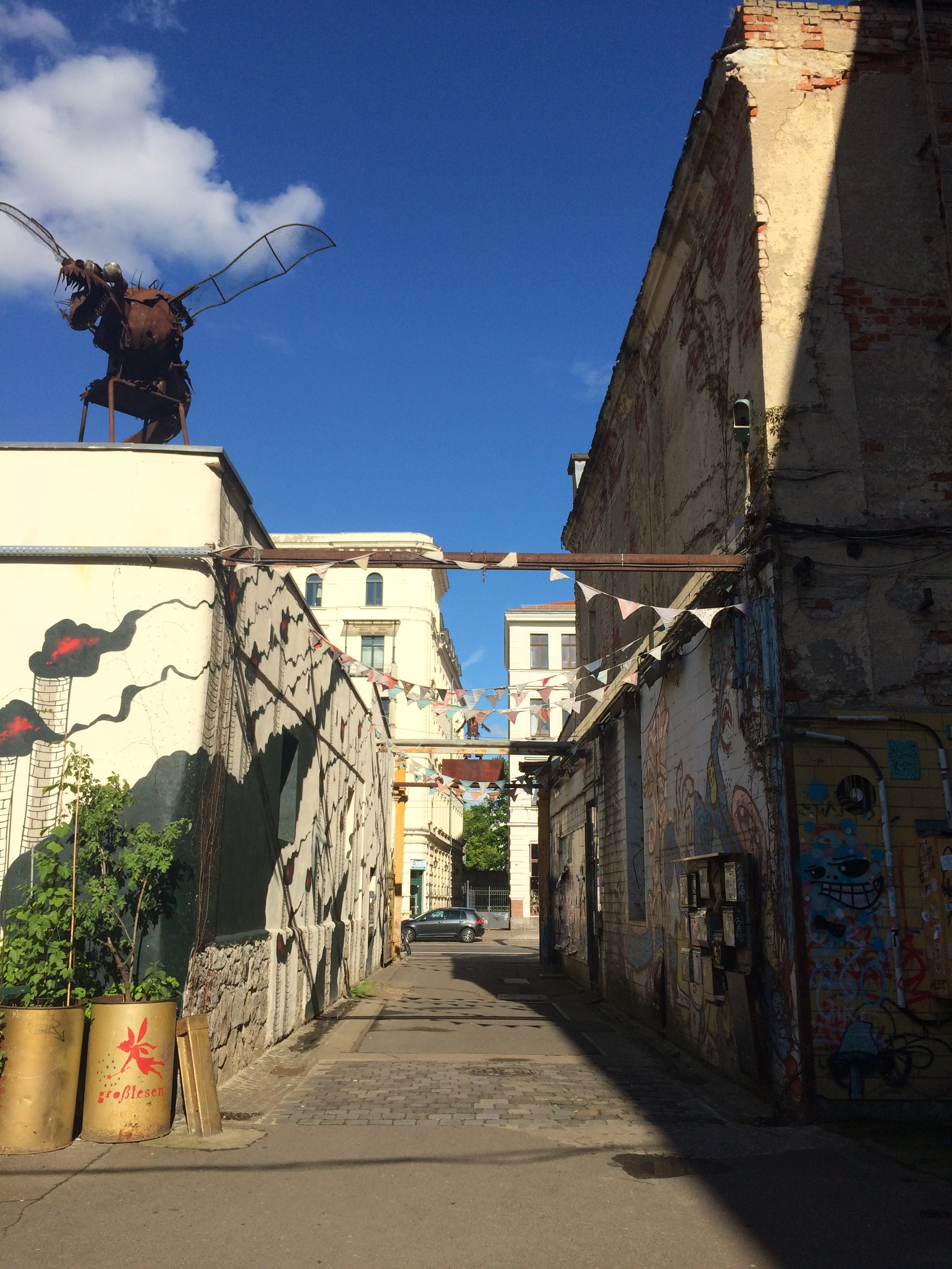 Impasse située au 51 menant à l'arrière boutique de la friperie "Mrs. Hippie". Ce lieu abrite également une scène où se déroulent des concerts durant la "KarLi Beben" annuelle